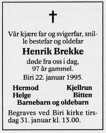 Dødsannonsen i Oppland Arbeiderblad, 26. januar 1995.